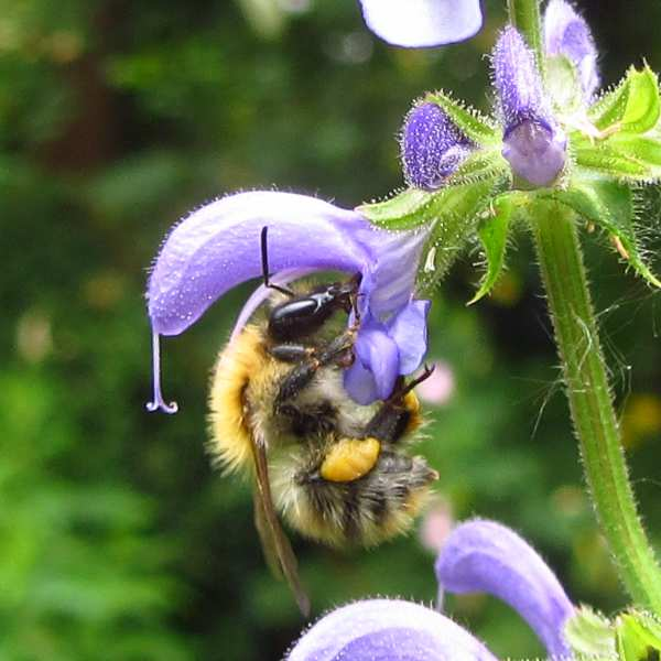 Ackerhummel beim Besuch einer Blüte des Wiesensalbei